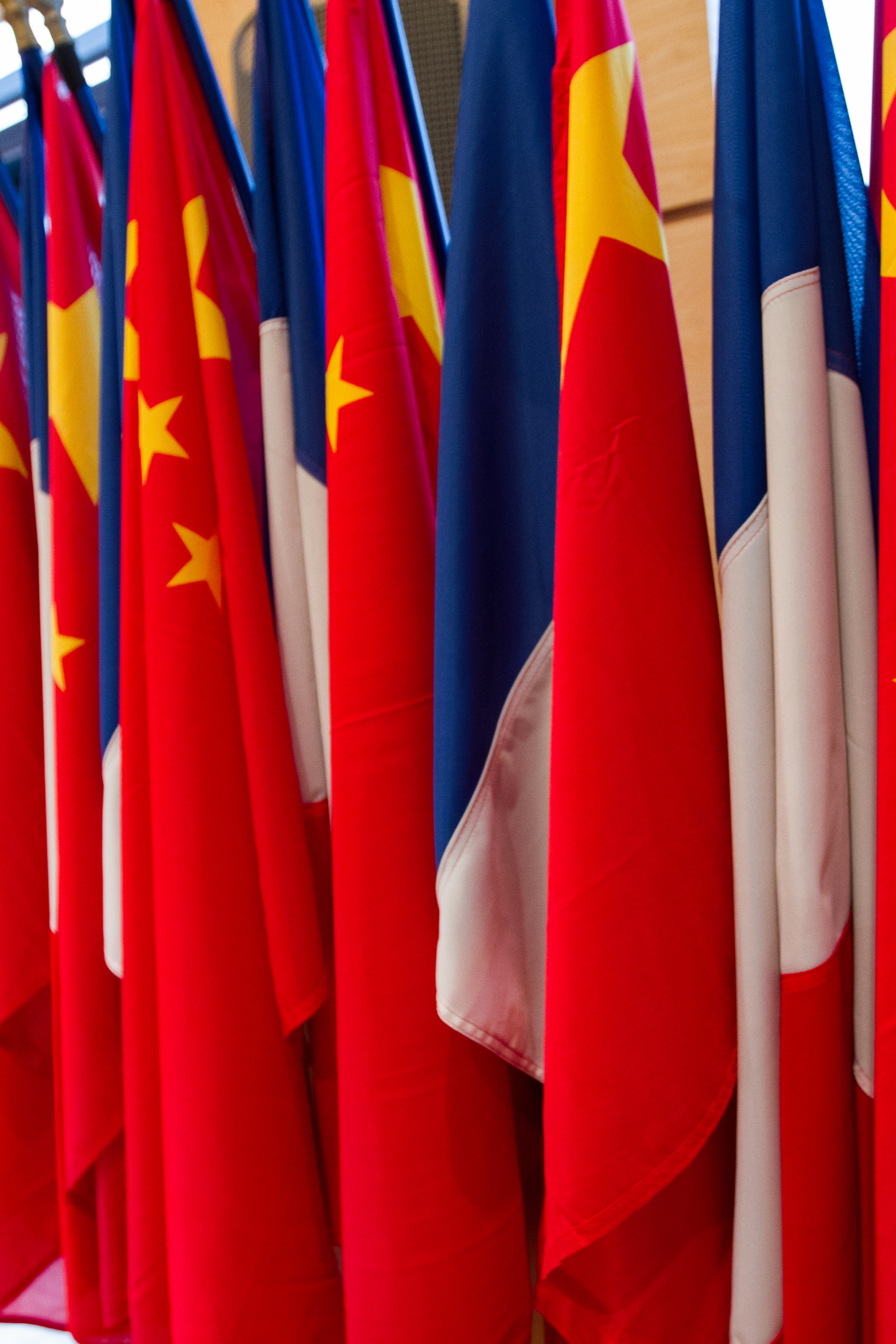 FIG 2013 Drapeaux Franco-Chinois